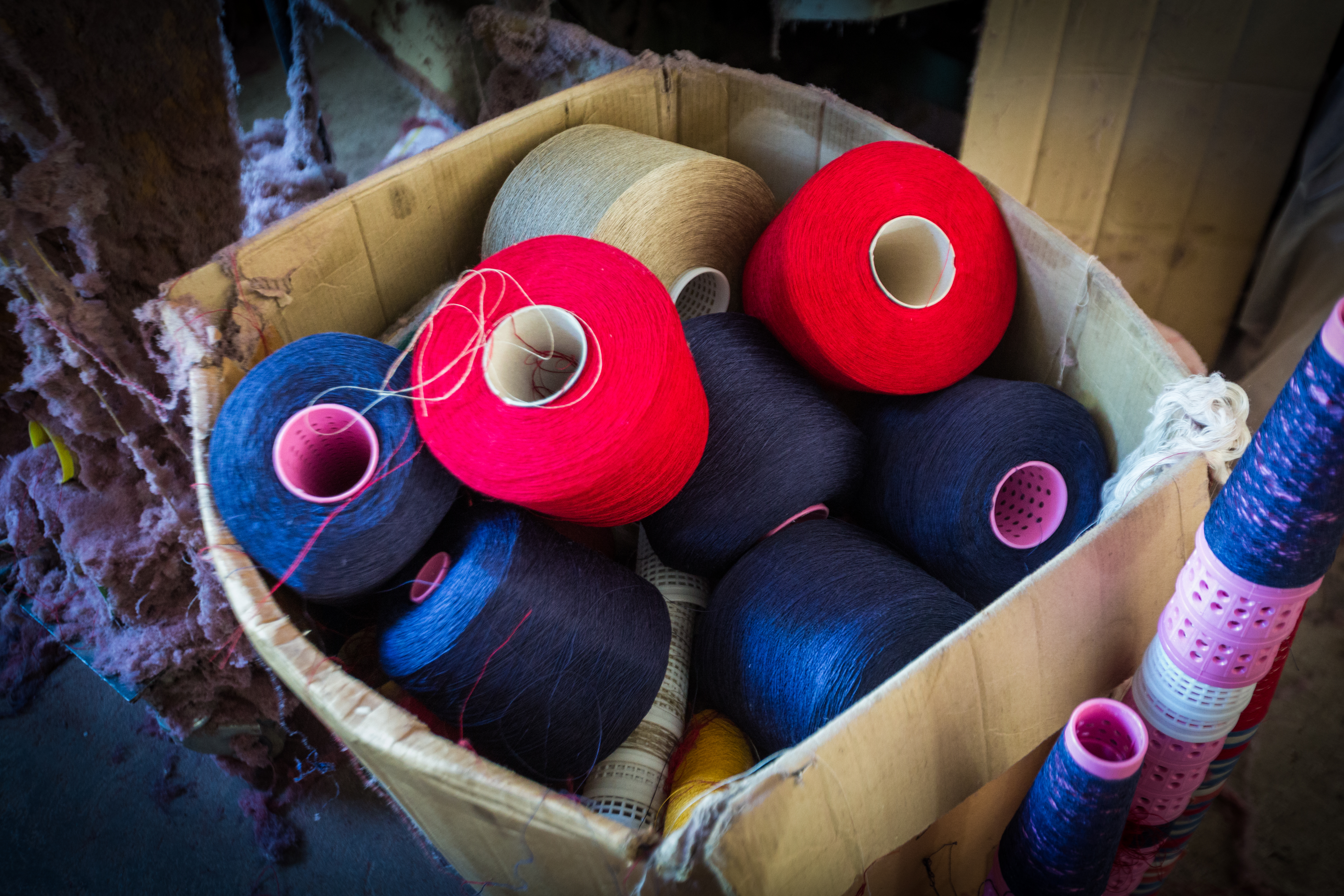 Bobines de fil de lin. A droite, les "paniers" en plastique autour desquels le fil est embobiné. Atelier de tissage Michel Gander - Muttersholtz mai 2015